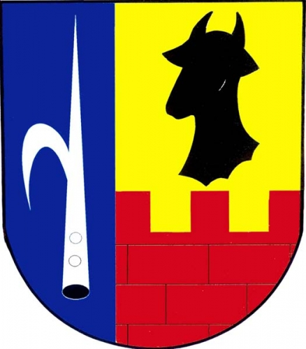 Znak obce Lelekovice.